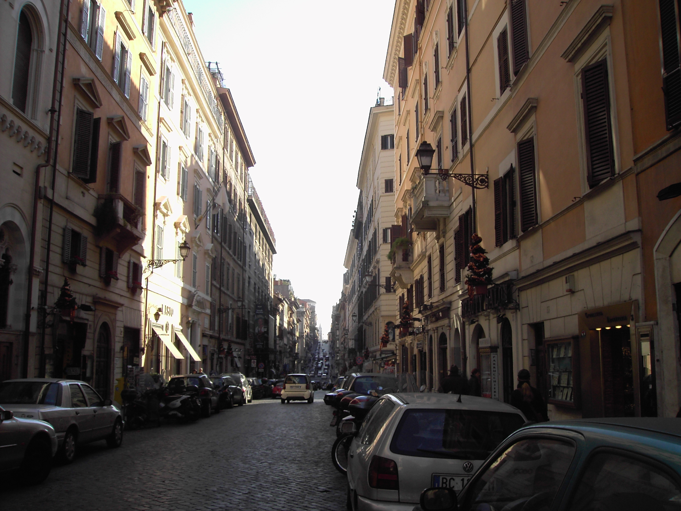 Roma, via Sistina